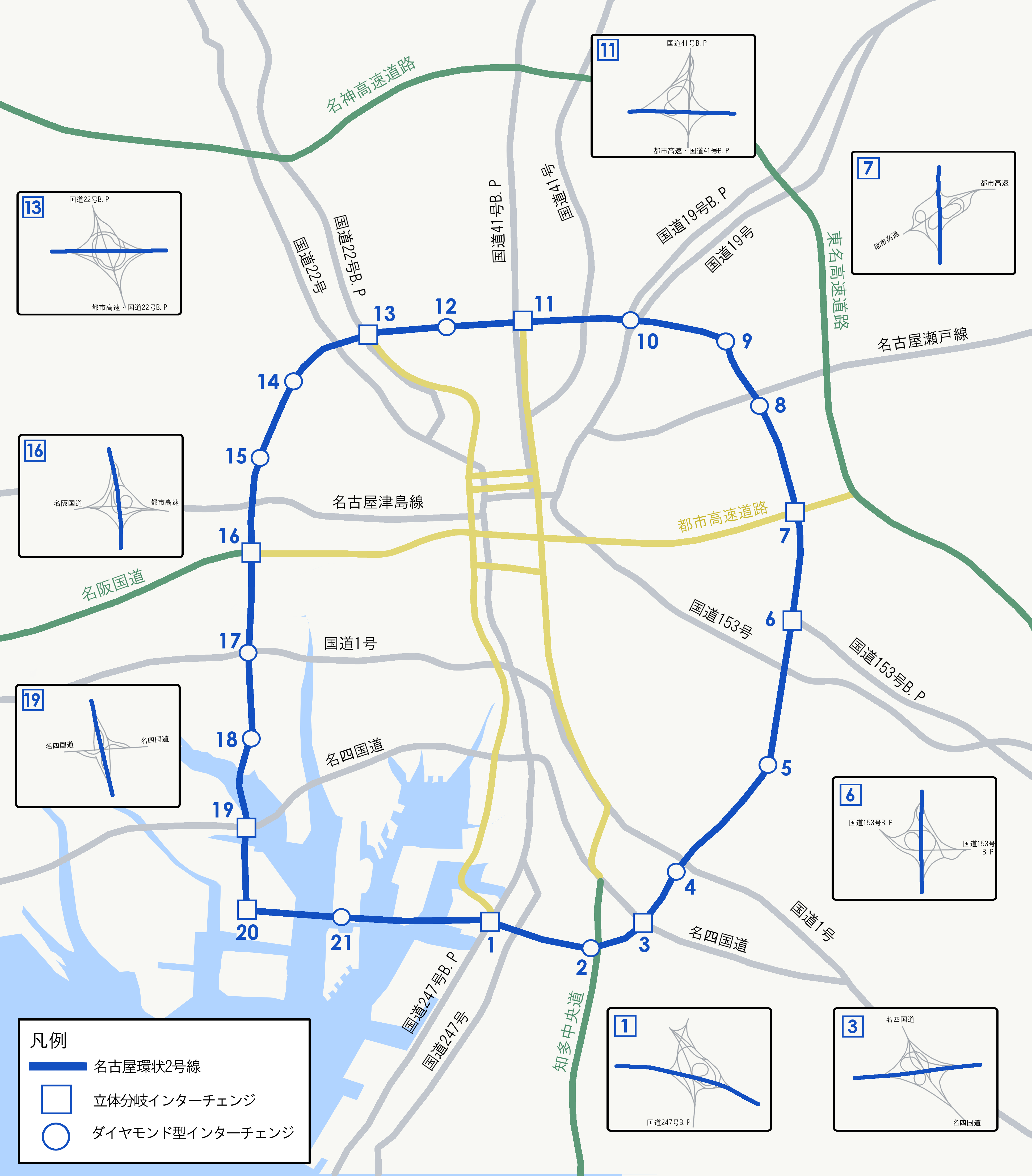 1967年3月、1969年6月時点の名古屋環状2号線専用部インターチェンジ計画図